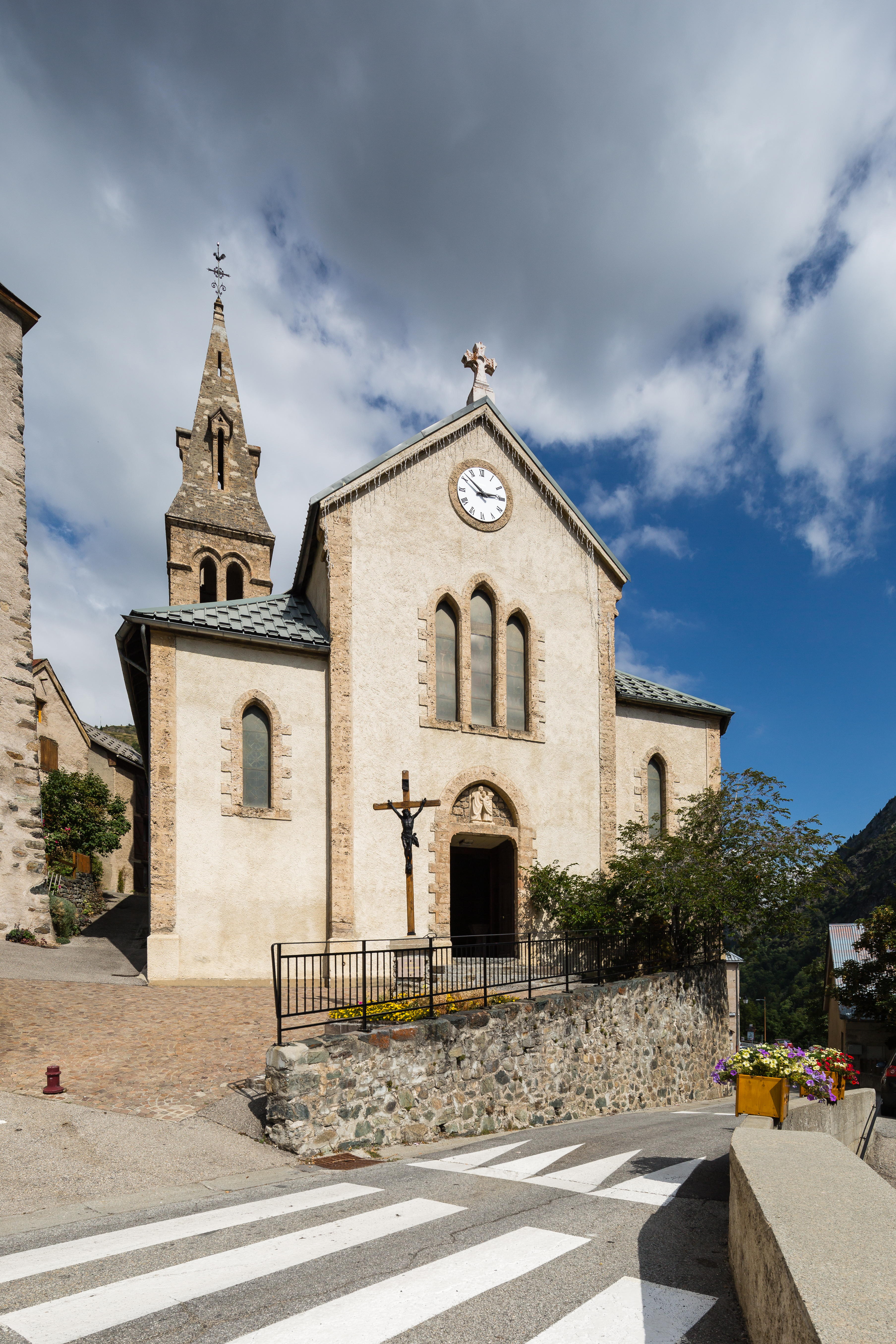 Façade de l'église Sainte-Anne d'Huez (France).